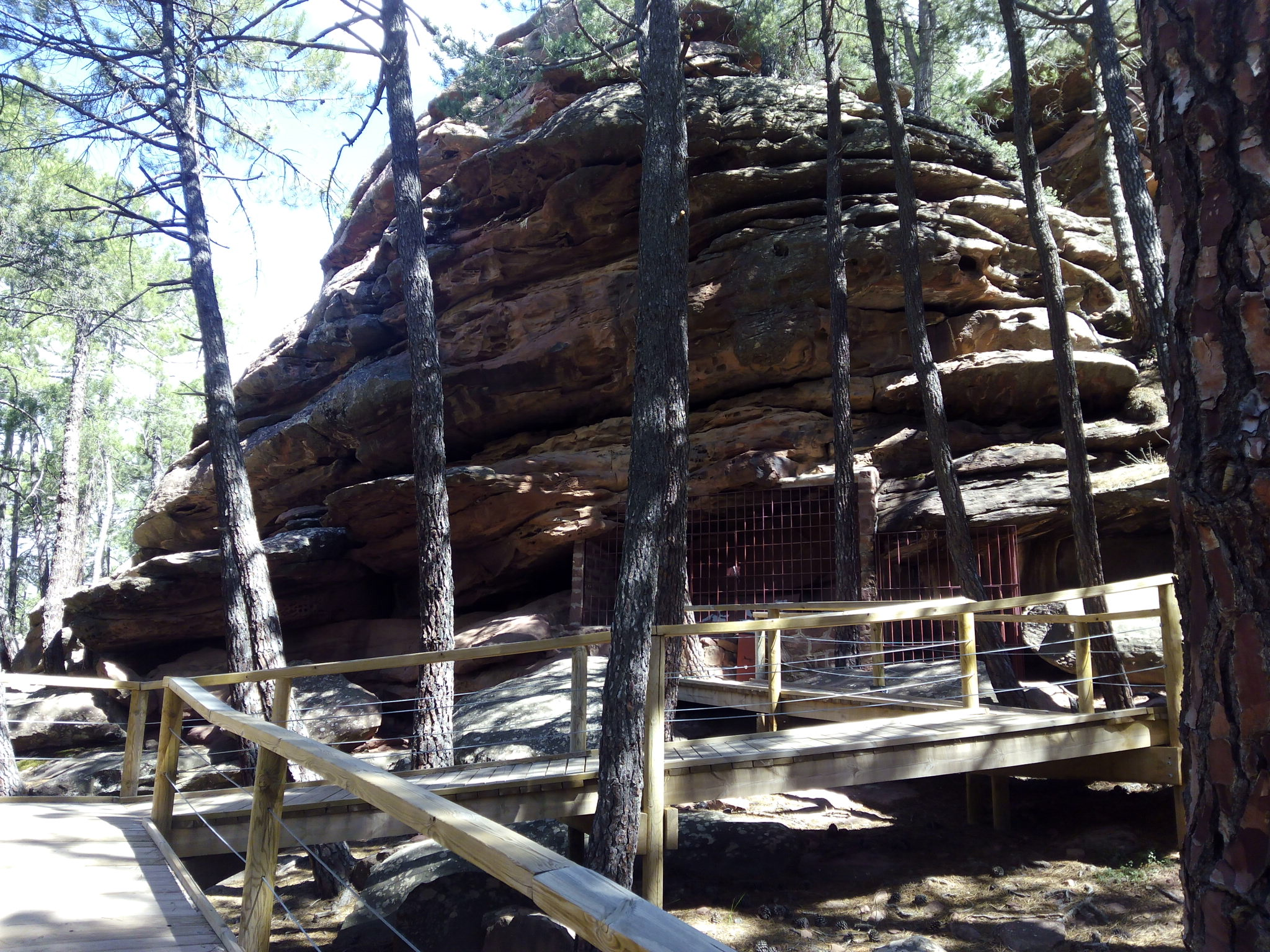 Vista exterior del Abrigo de la Cocinilla del Obispo